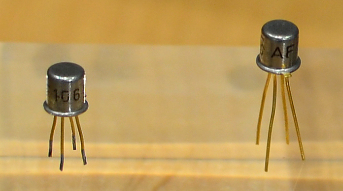 GLAM im Deutschen Museum Bonn, Mesa Transitoren AF 106 und AF 139